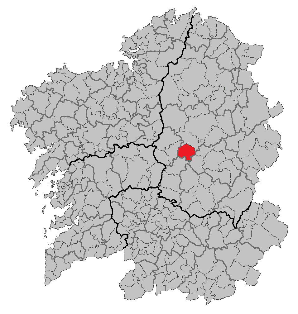 Mapa coa localización do concello de Portomarín.